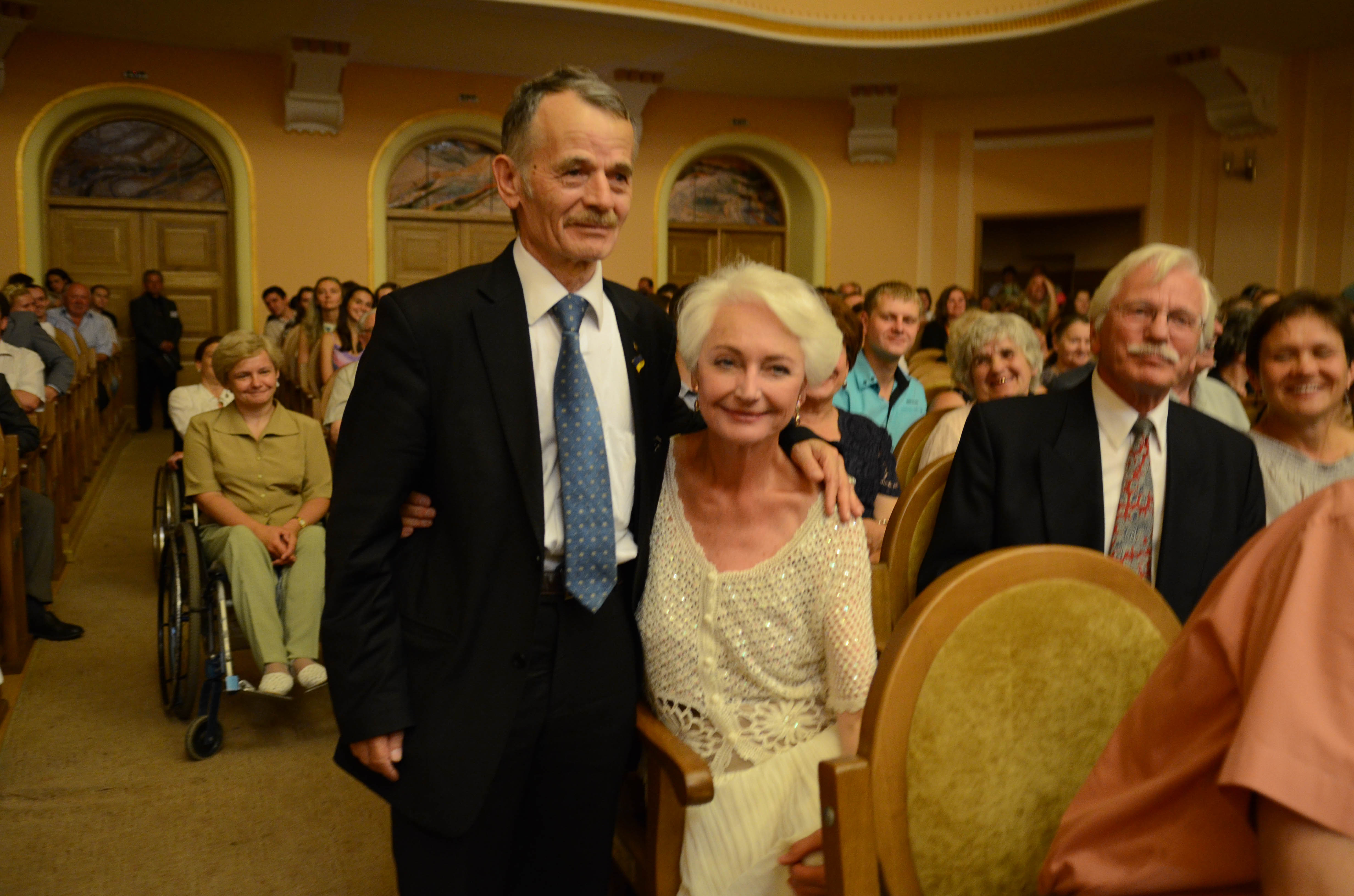 на врученні премії